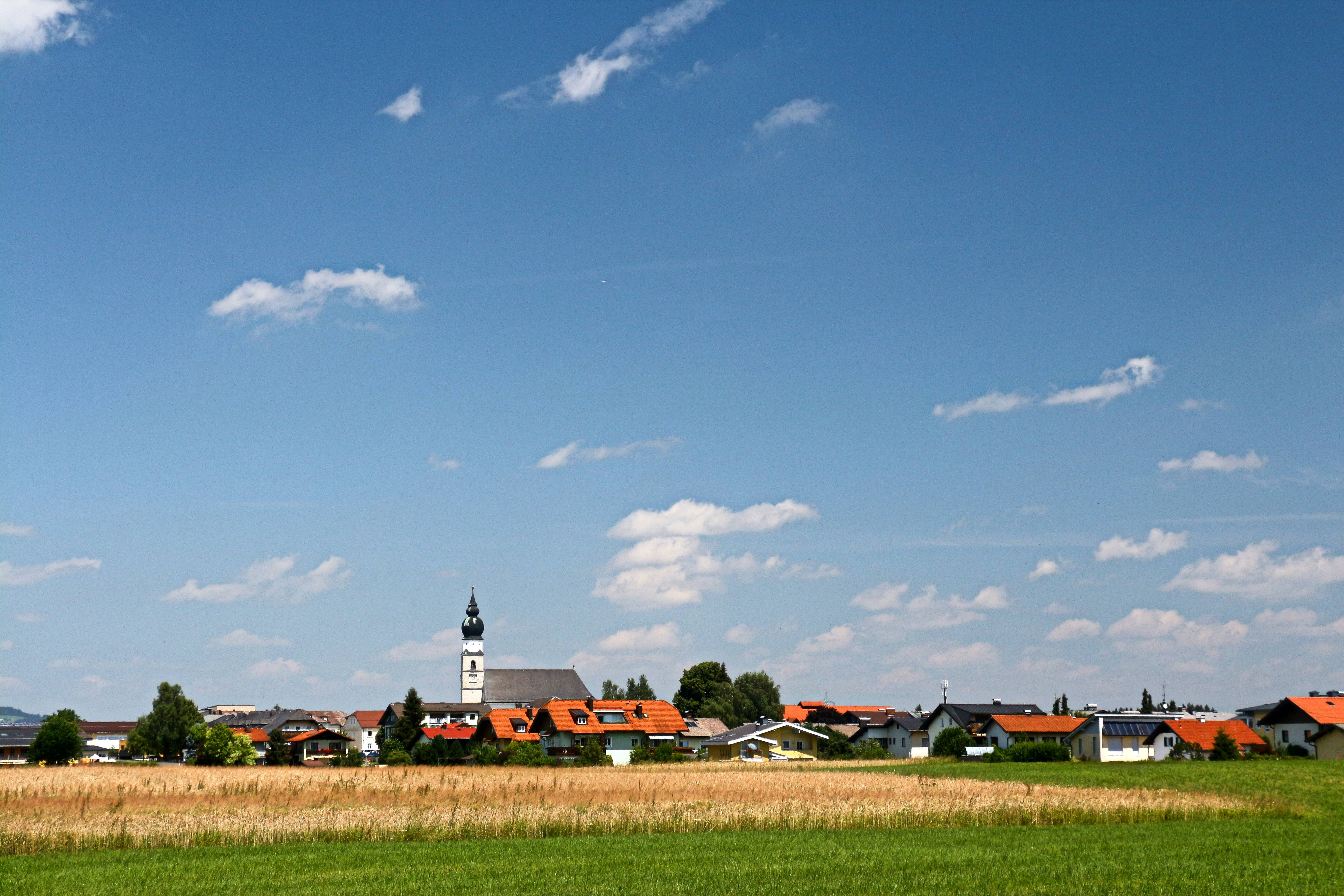 Blick nach Eugendorf von der Trasse der ehemaligen Salzkammergut-Lokalbahn, der sogenannten Ischlerbahn